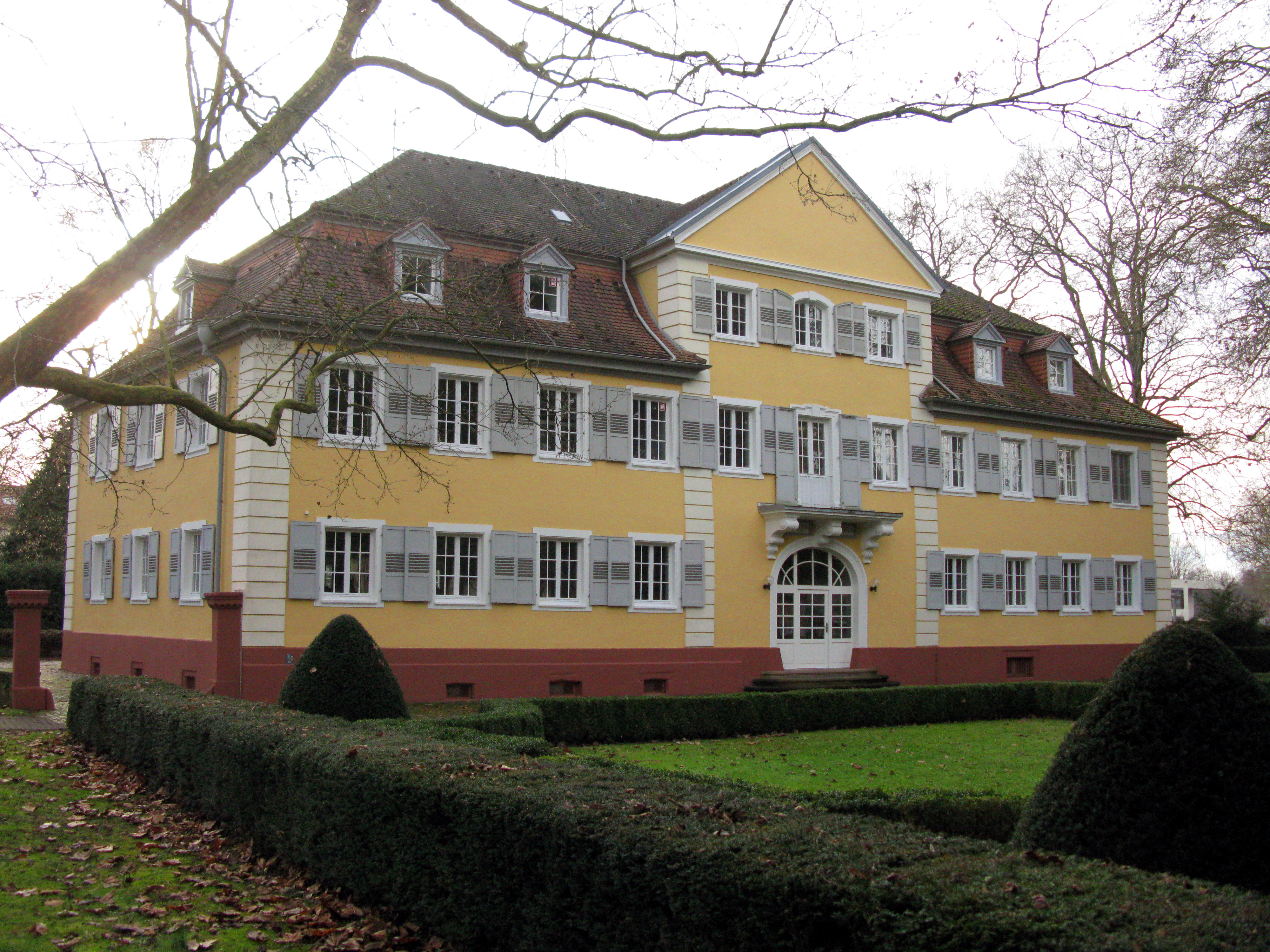 Weiherschloss auf dem Gelände des Zentrums für Psychiatrie in Emmendingen, heute Sitz der Schule für Gesundheits- und Krankenpflege